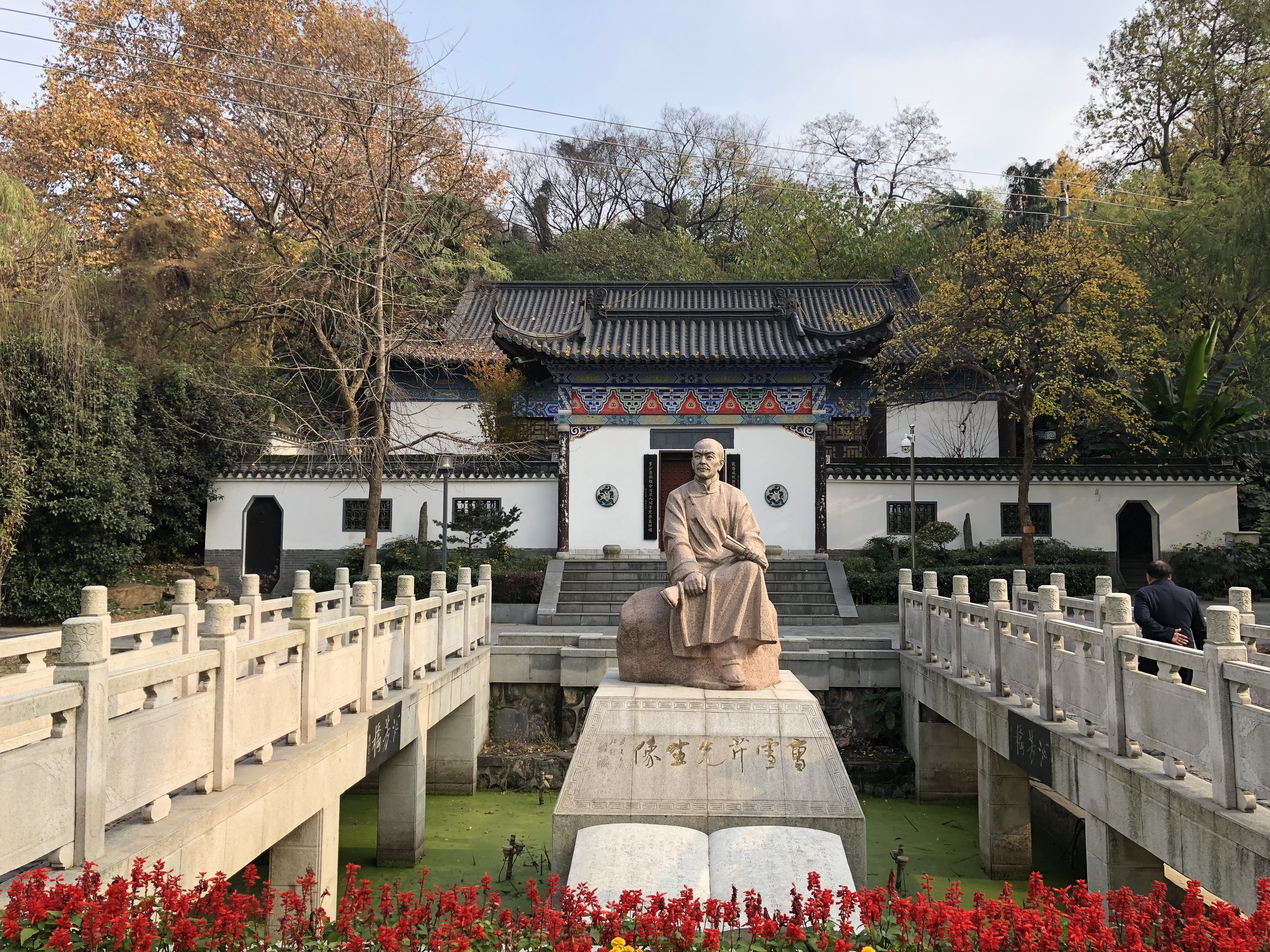 中文（中国大陆）: 南京曹雪芹纪念馆